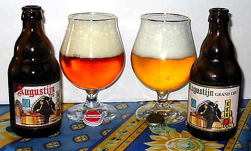 Augustijn and Augustijn Grand Cru from bry. Van Steenberge - Bios